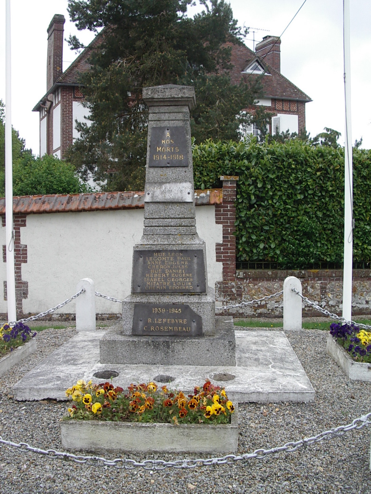 Monument aux mort de Granchain (France, Eure)